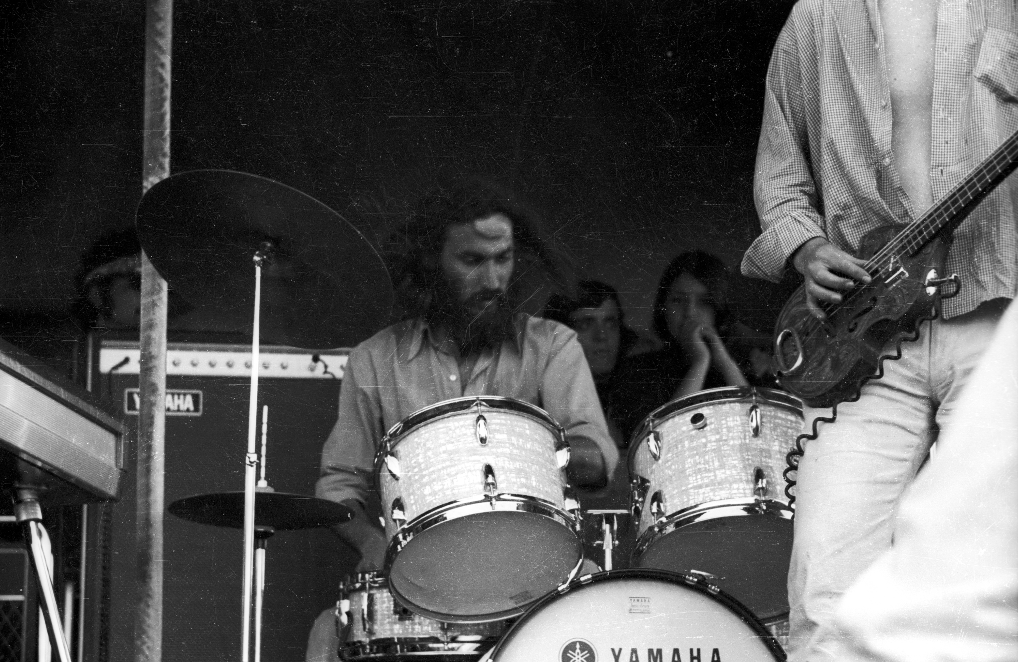 Gabriel Parra Pizarro (* Valparaíso, 25 de julio de 1947 - † Lima, Perú, 15 de abril de 1988) fue un músico chileno. Se desempeñó como baterista de la banda chilena Los Jaivas.